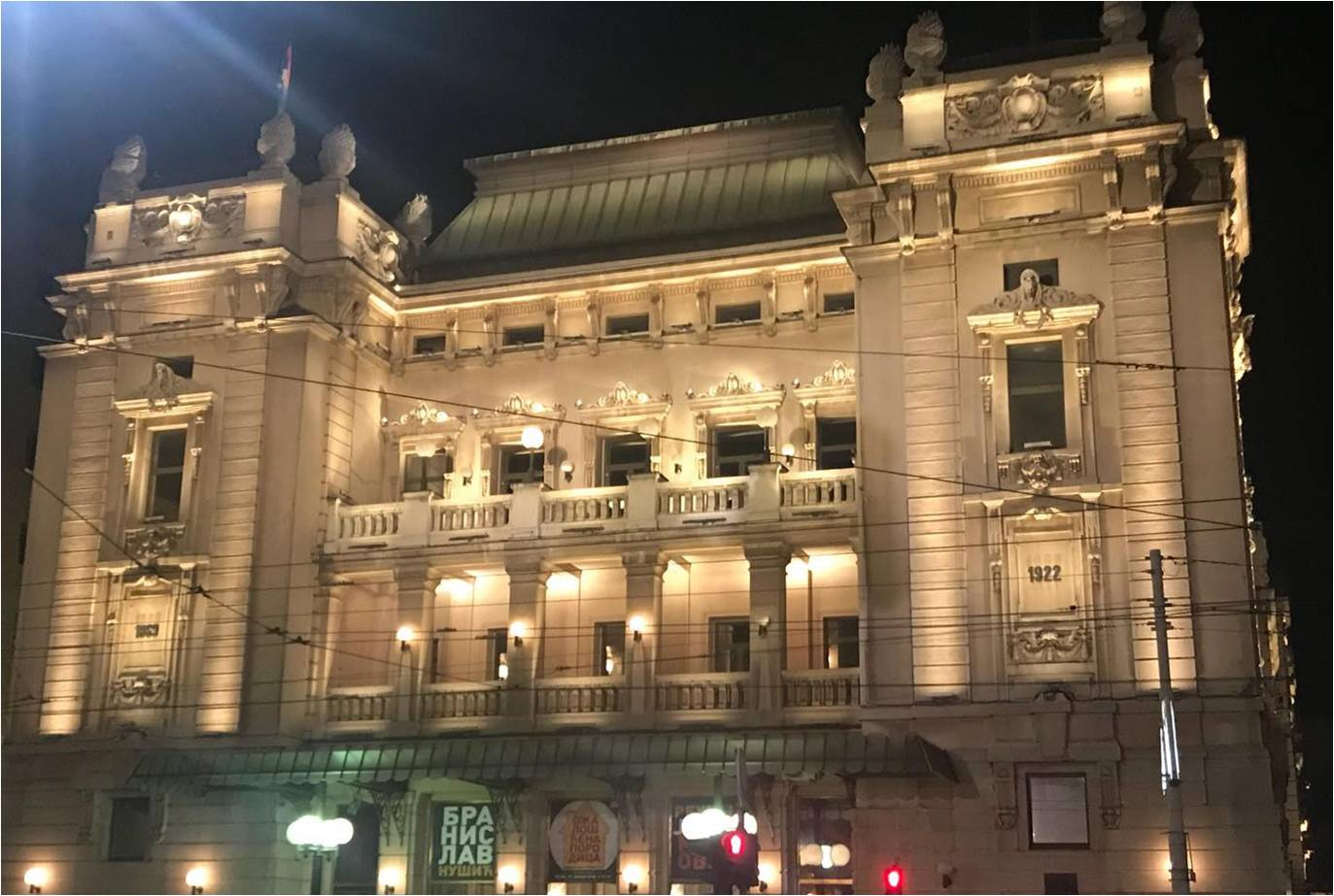 Народно позориште